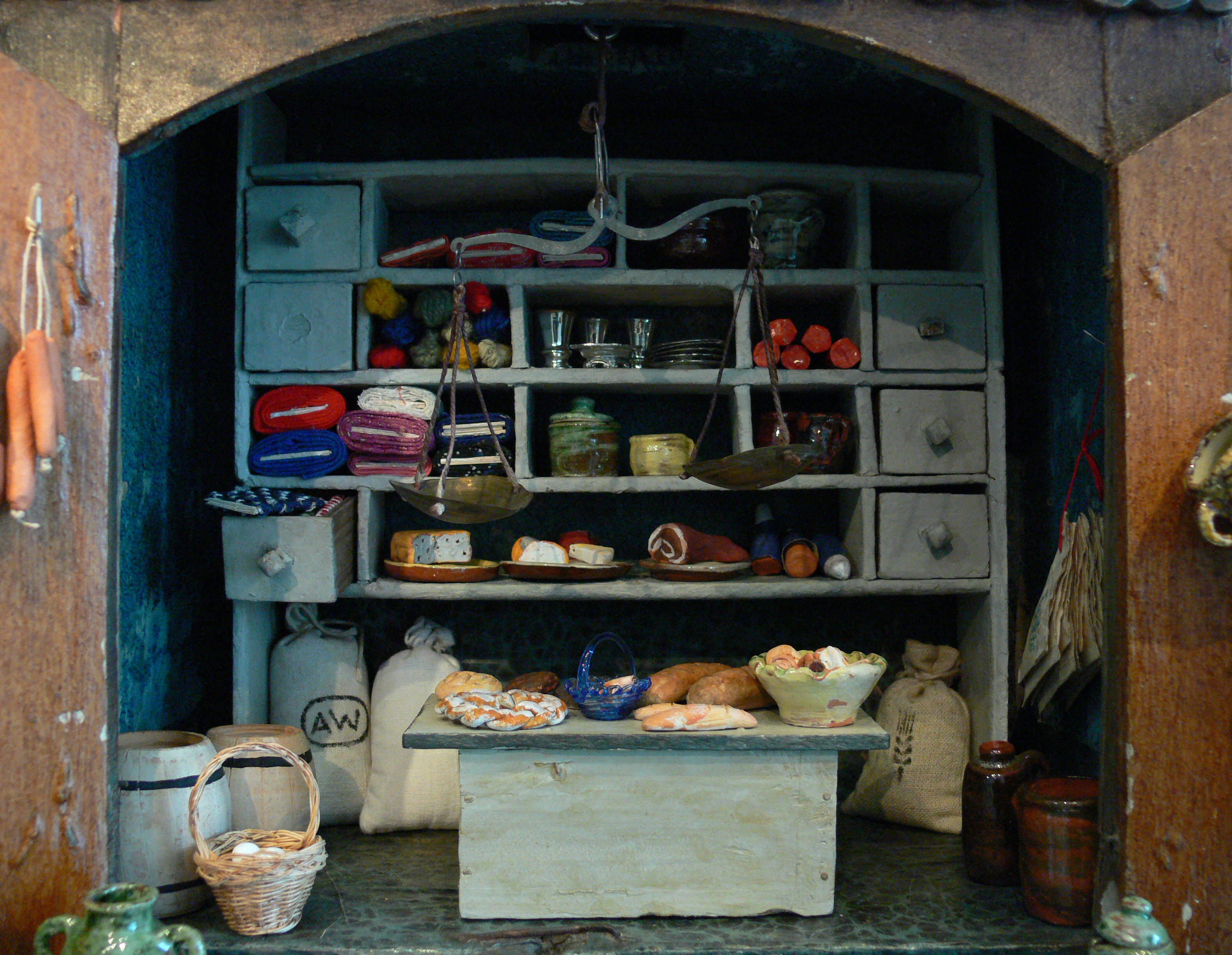 Kaufladen, um 1830 Schlossmuseum Aulendorf (Zweigmuseum des Württembergischen Landesmuseums)